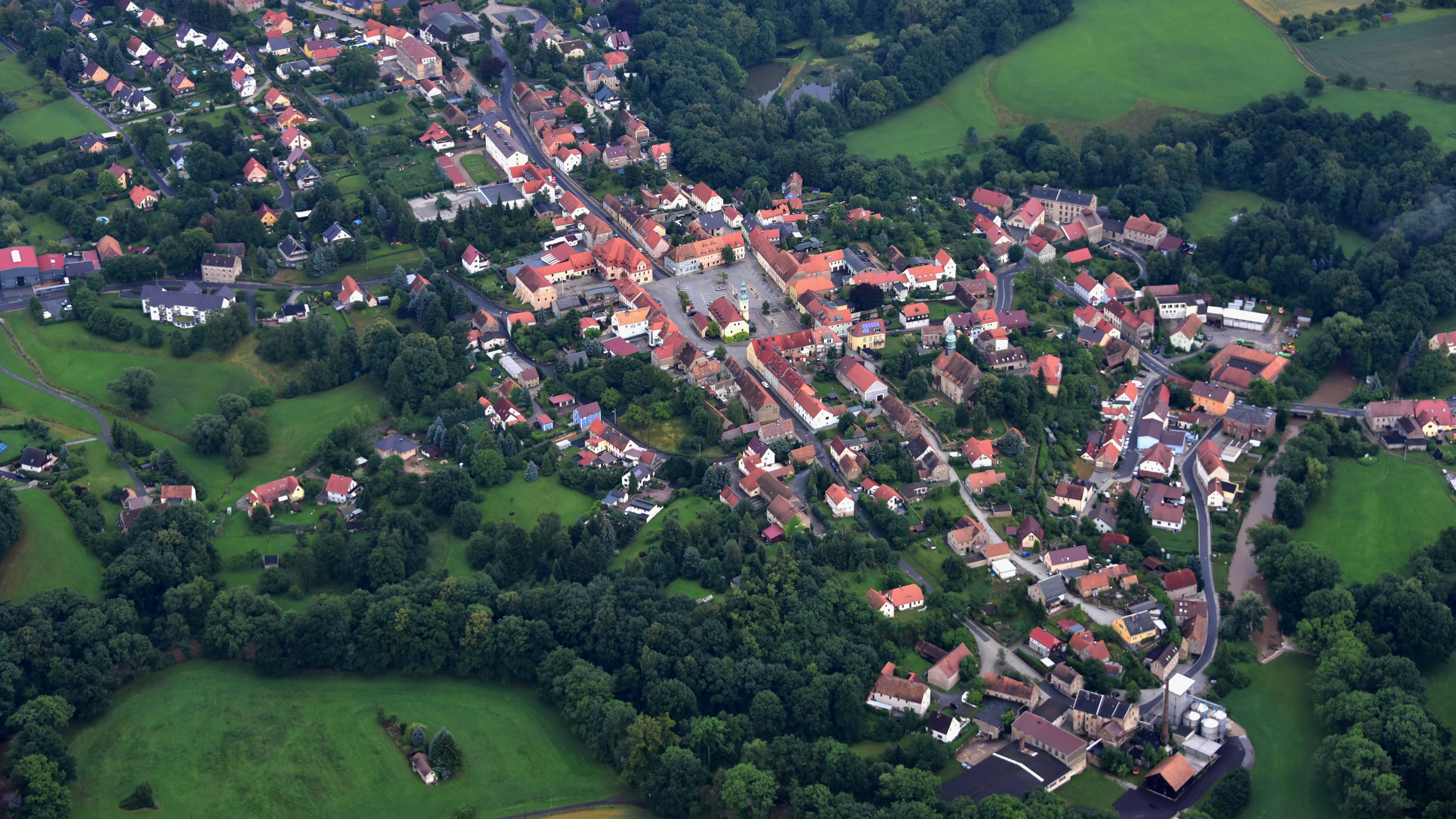 Weißenberg, Luftaufnahme (2017) Hornjoserbsce: Powětrowy wobraz Wósporka (2017)